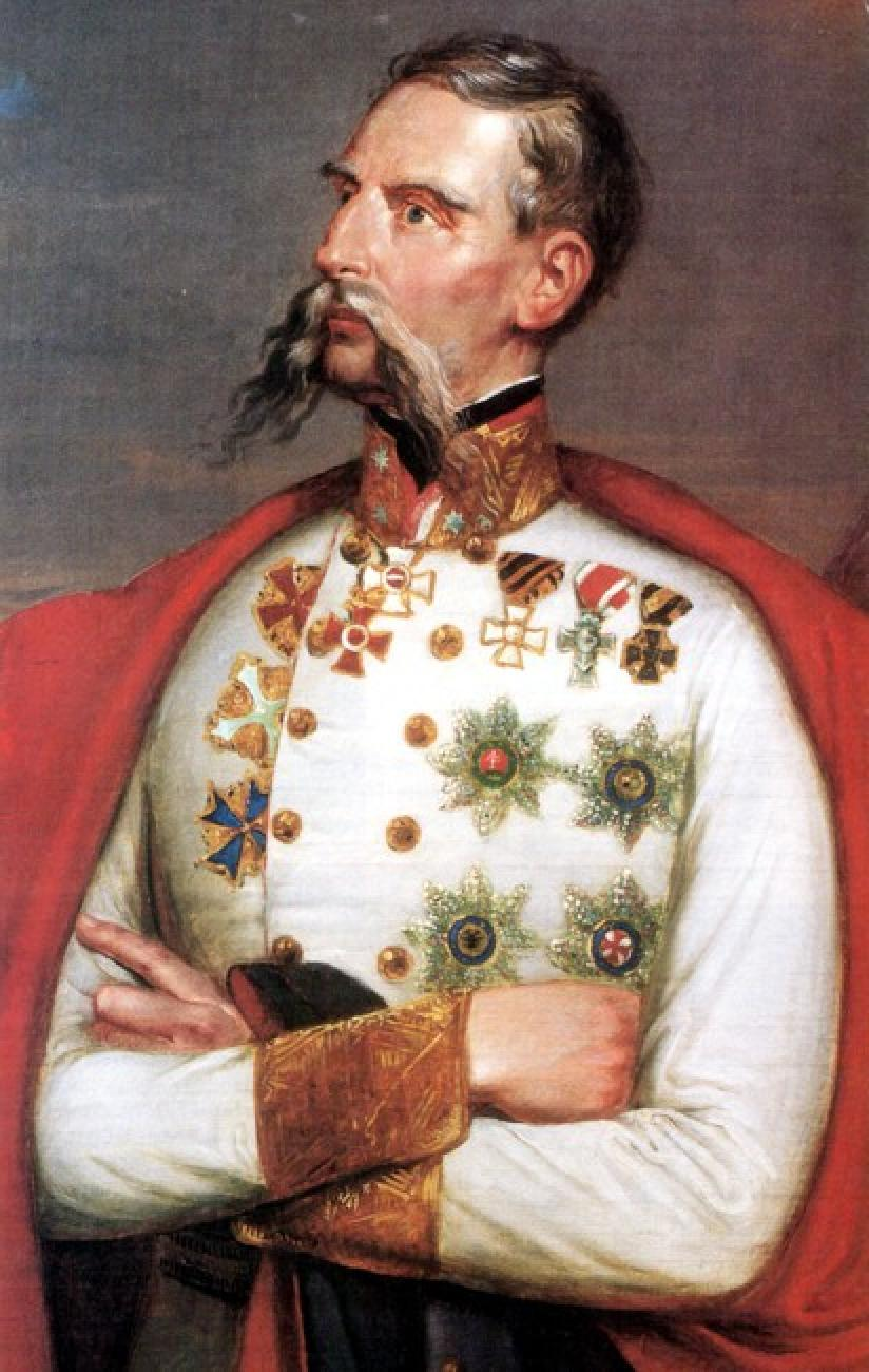 Julius Jacob von Haynau (ismeretlen művész festménye)